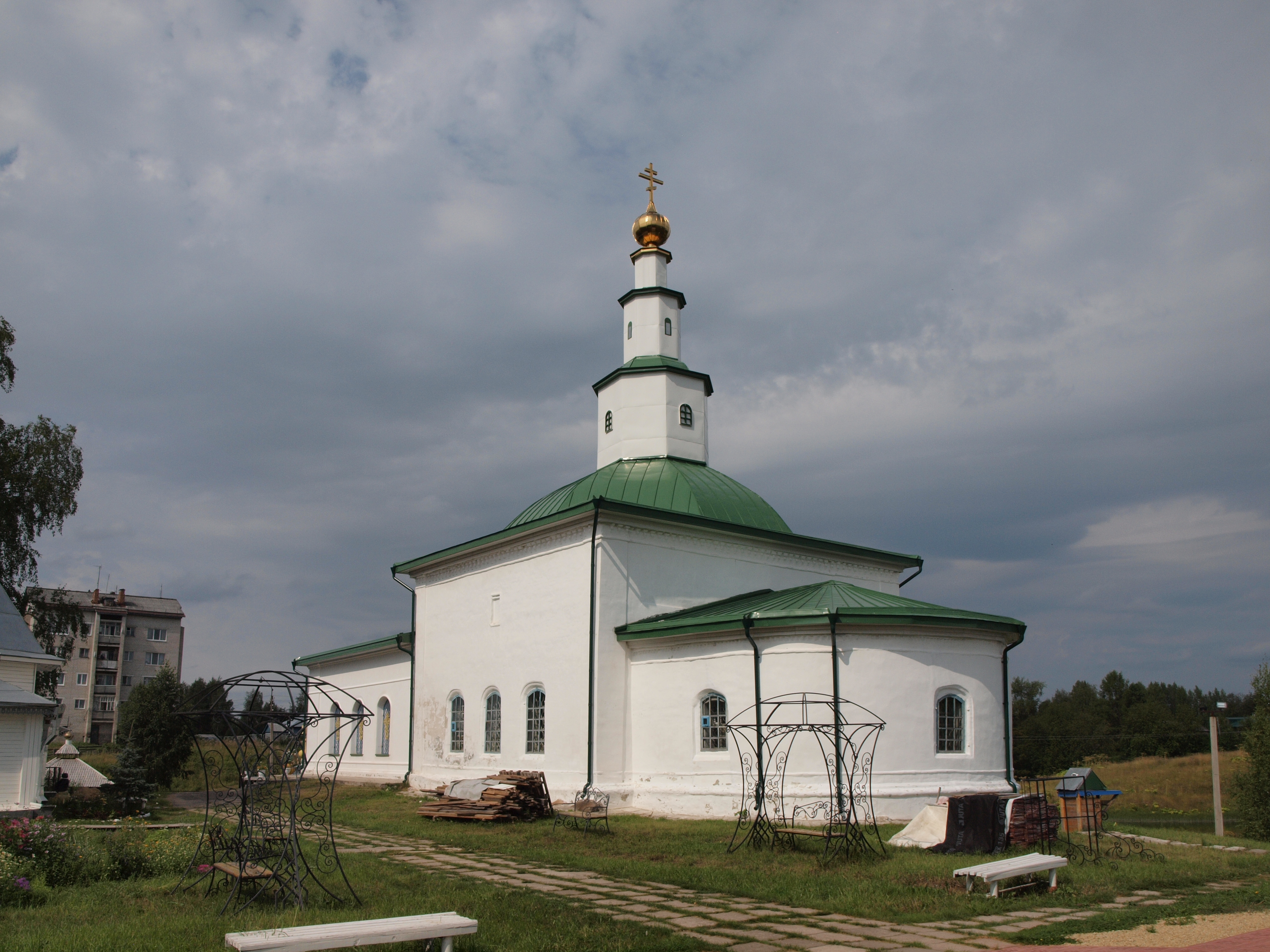 Церковь Стефана Пермского: Усть-Вымь, Усть-Вымский район, республика Коми